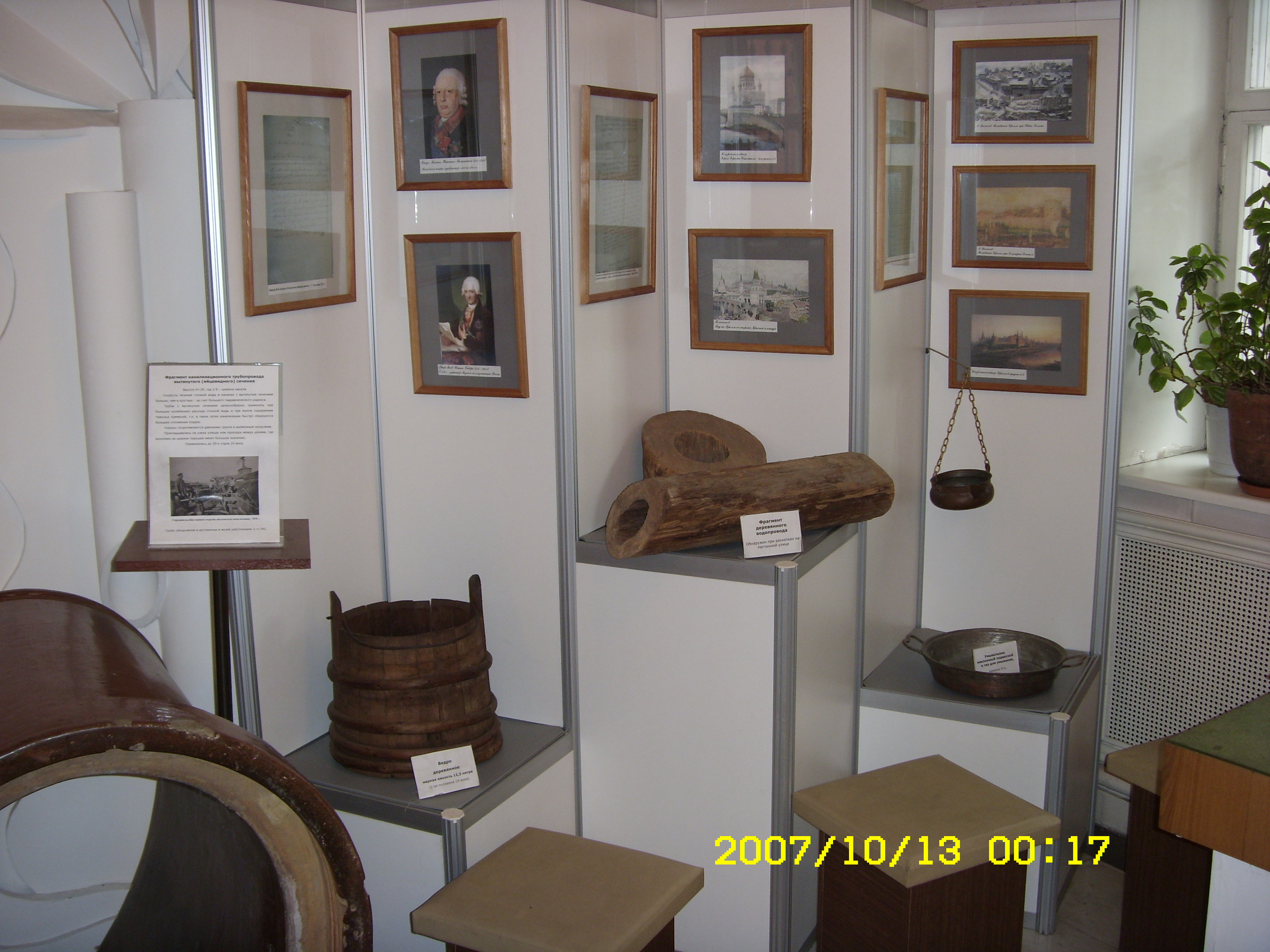 Музей воды (Москва), стенды музея